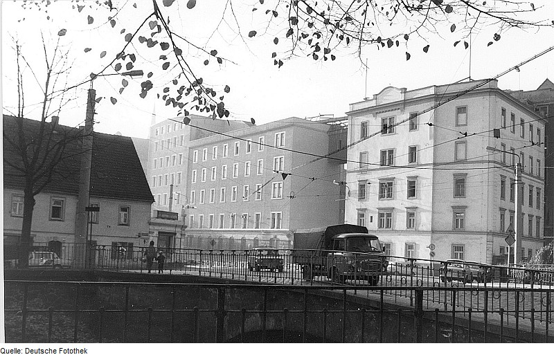 Original image description from the Deutsche FotothekDresden-Plauen. Bienertmühle (frühere Hofmühle)